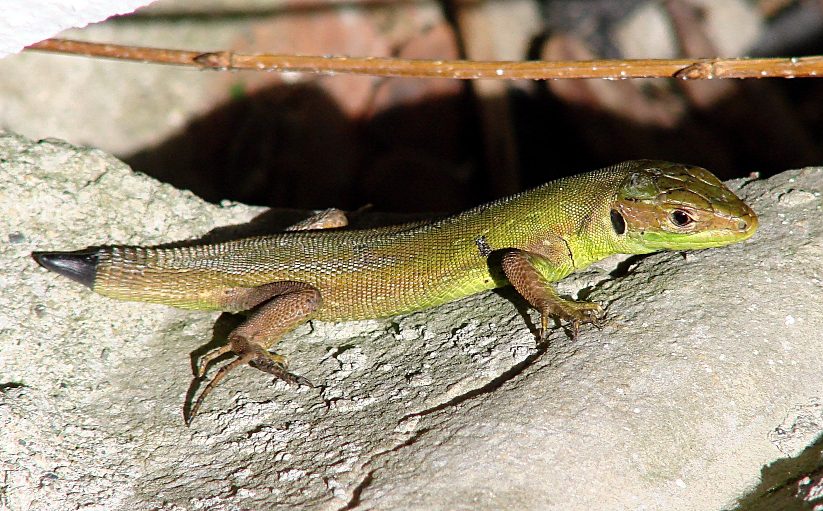 Lézard vert juvénile (Lacerta bilineata) avec une queue en phase de régénération